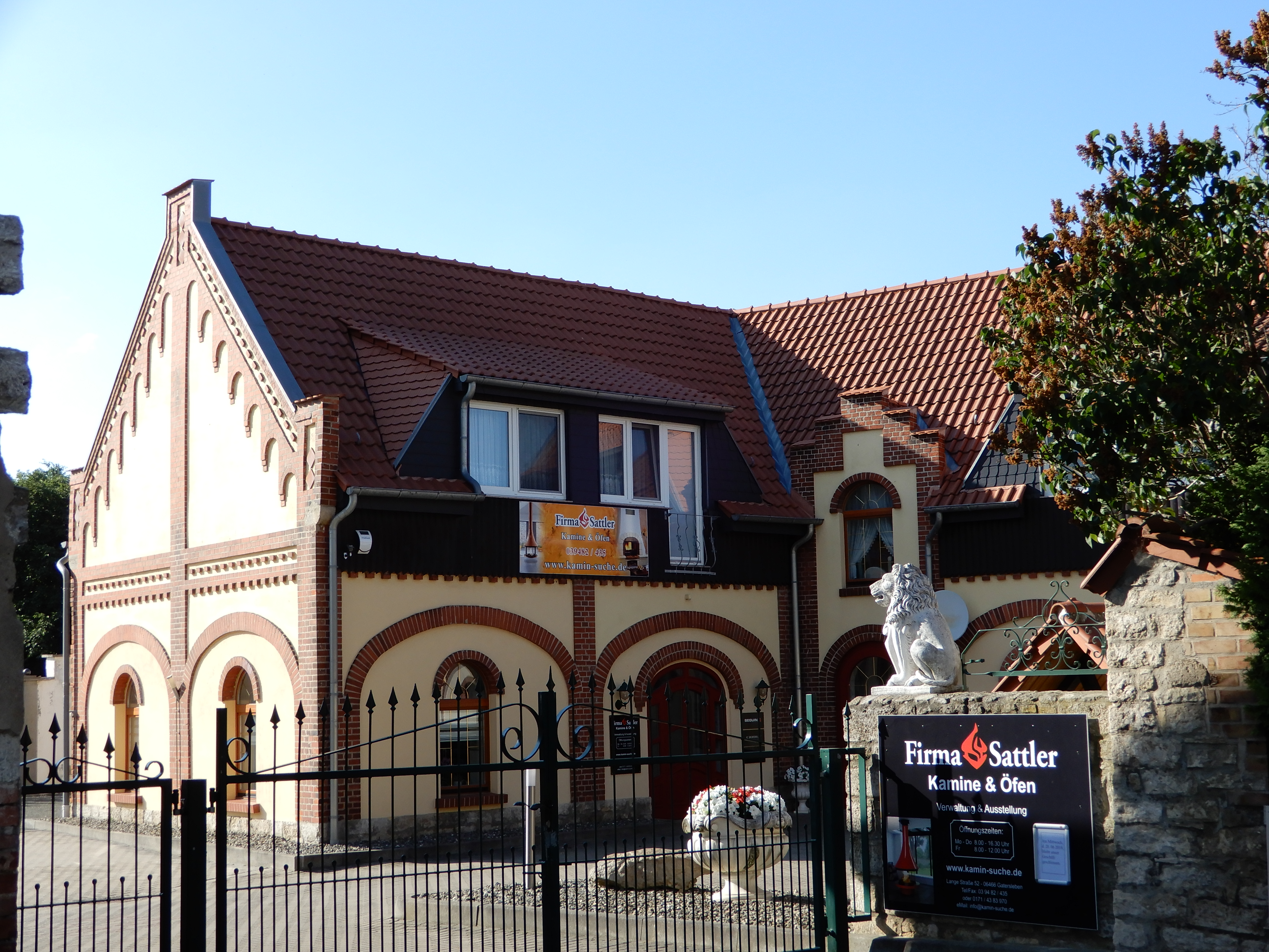 Gatersleben, Lange Straße 52